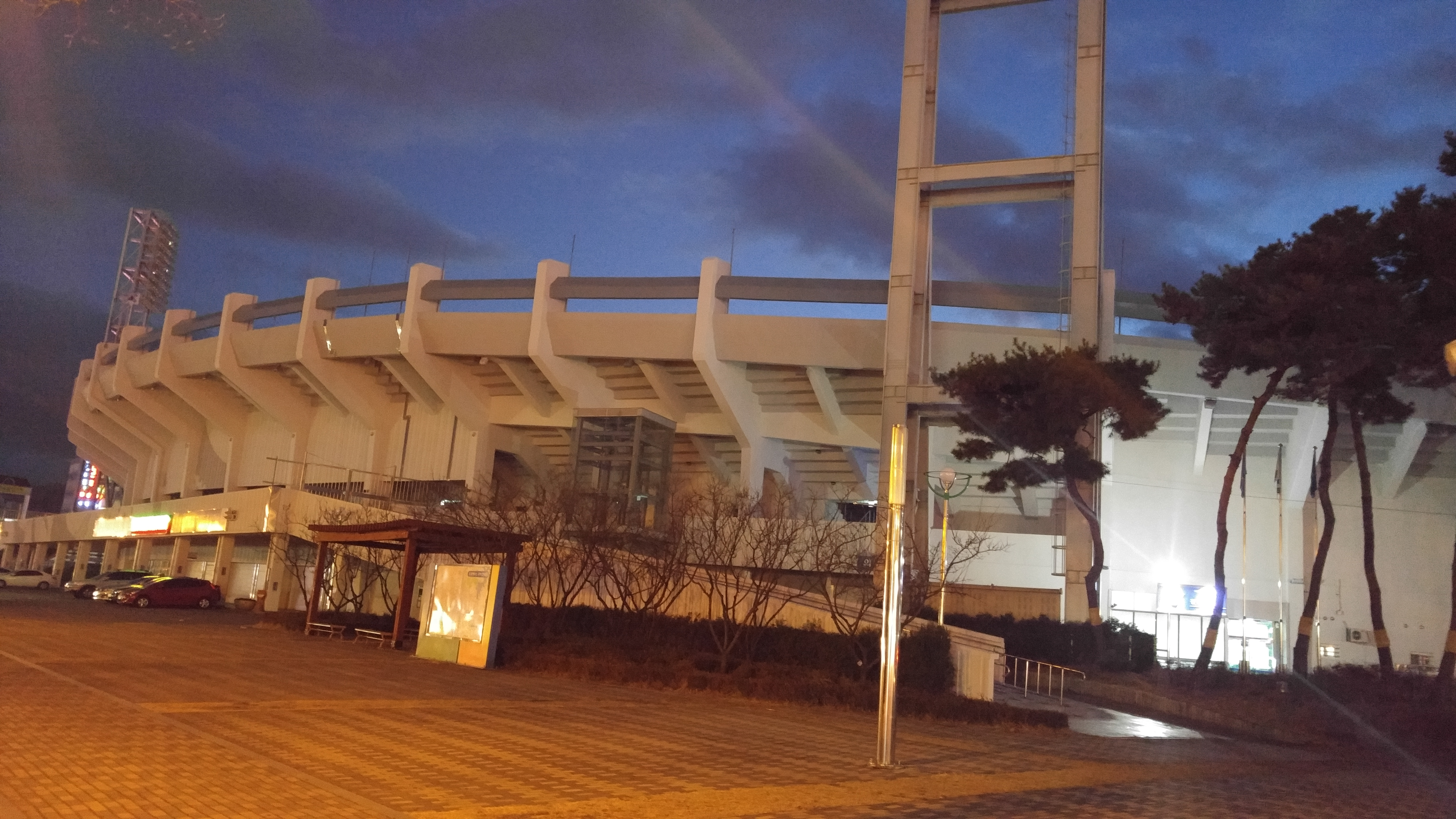 한밭종합운동장 주경기장